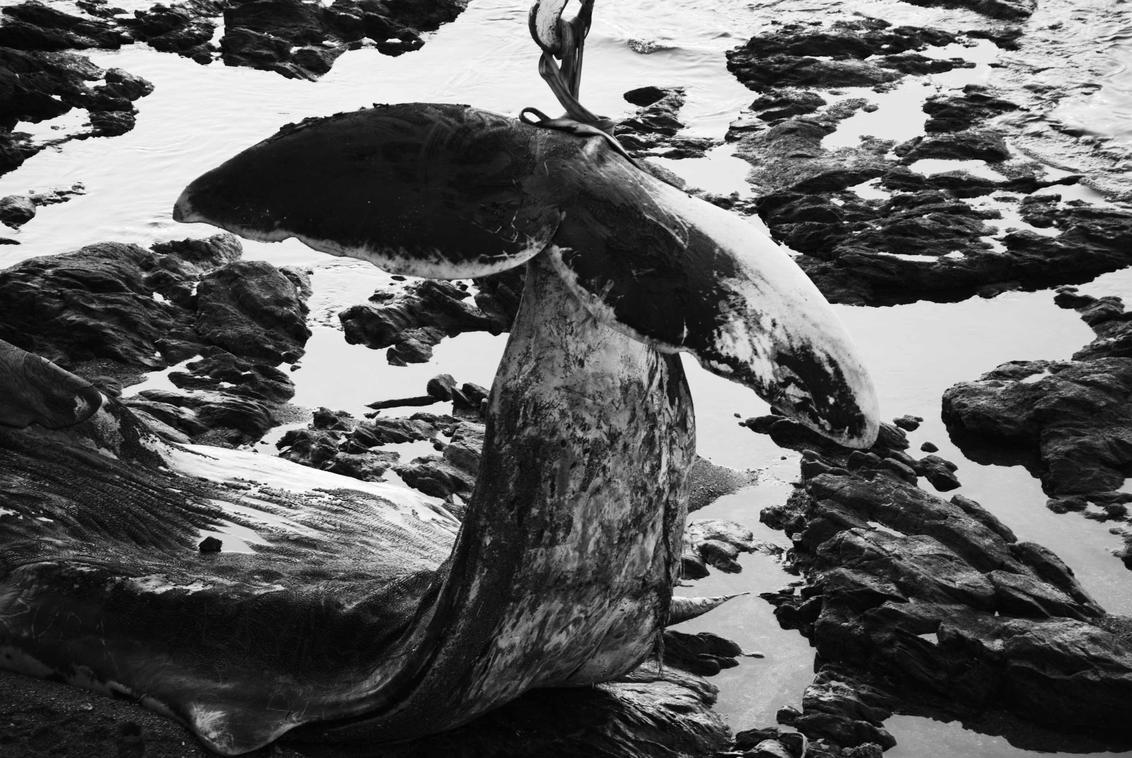 Cola